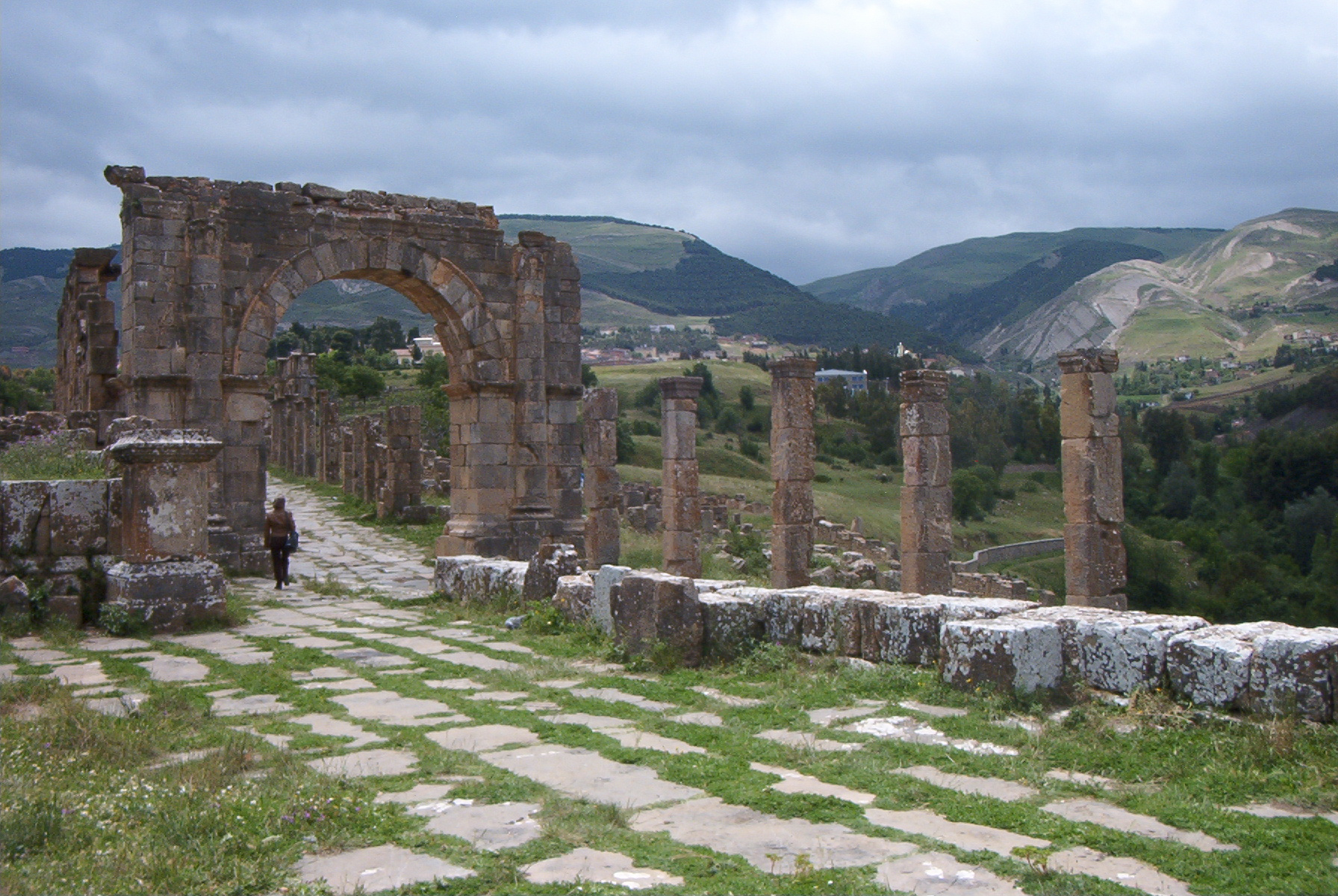 Djémila, le cardo vu depuis la basilique civile